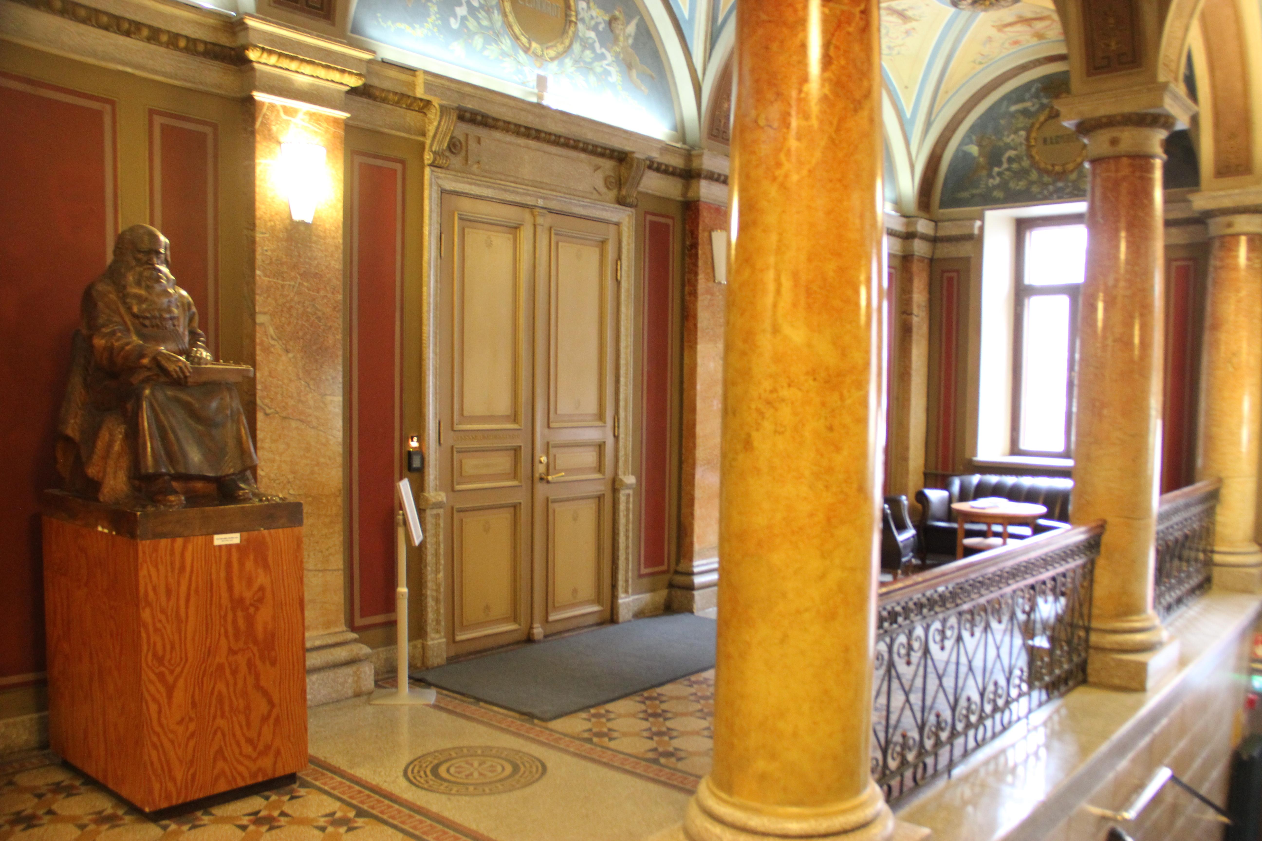 Suomalaisen Kirjallisuuden Seura, sisääntuloaulan pylväikkö, taitaa oll Väinämöisen patsas